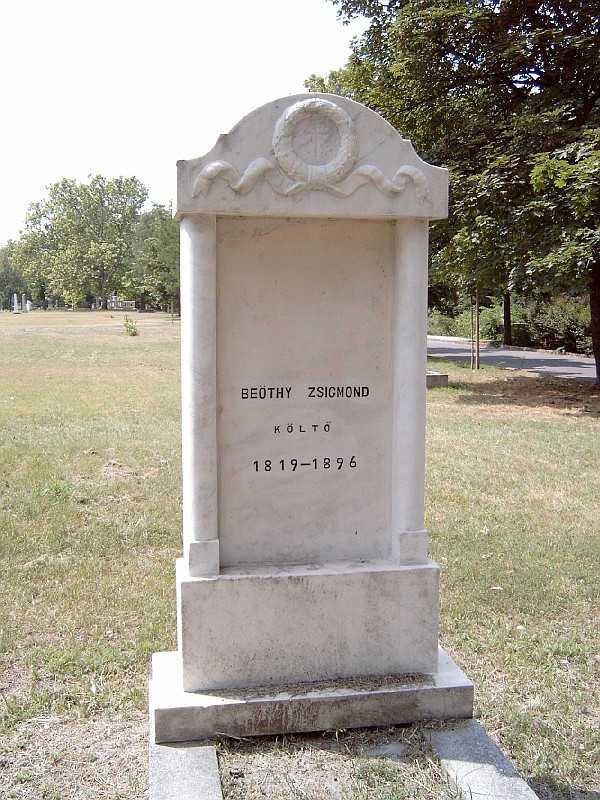 Beöthy Zsigmond sírja Budapesten a Kerepesi temetőben.